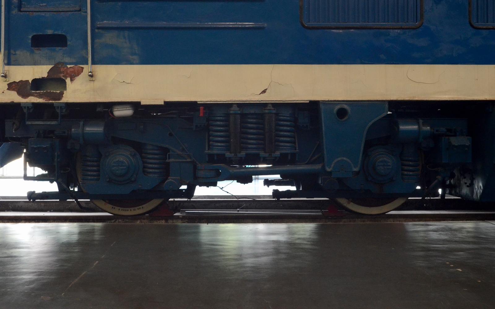 中文（中国大陆）: 北京型机车的二轴转向架